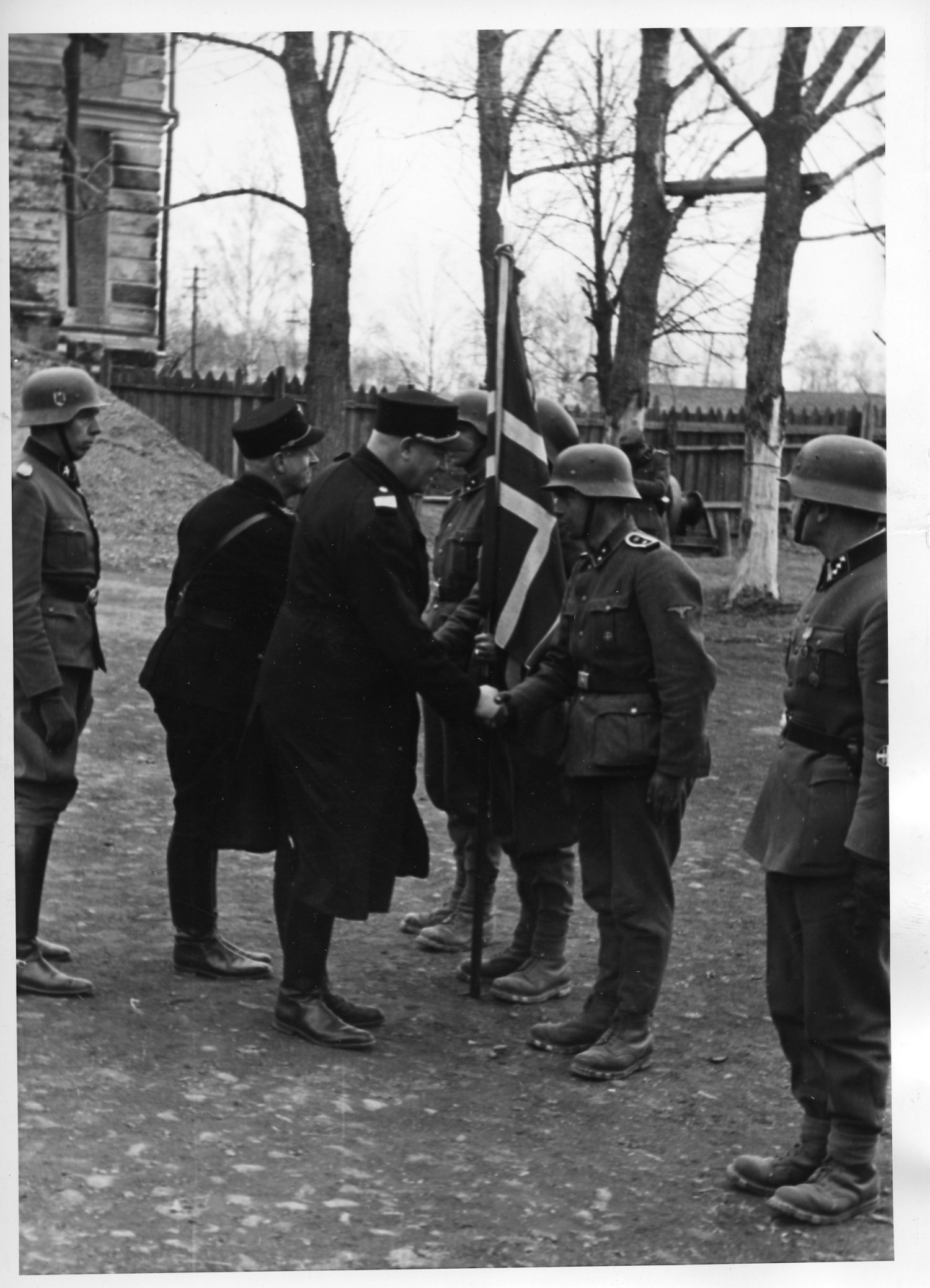 Vor Leningrad. Mai 1942. Vidkun Quisling bei den norweg. Freiwilligen. Unter den mit dem EK ausgezeichneten Freiwilligen befindet sich auch der ZZ-Hauptscharführer Ostreng, der in Norwegen Leiter der Hird-Jugend ist. 1942/05. RA/S-1256 /U 1/1-3 (img405)